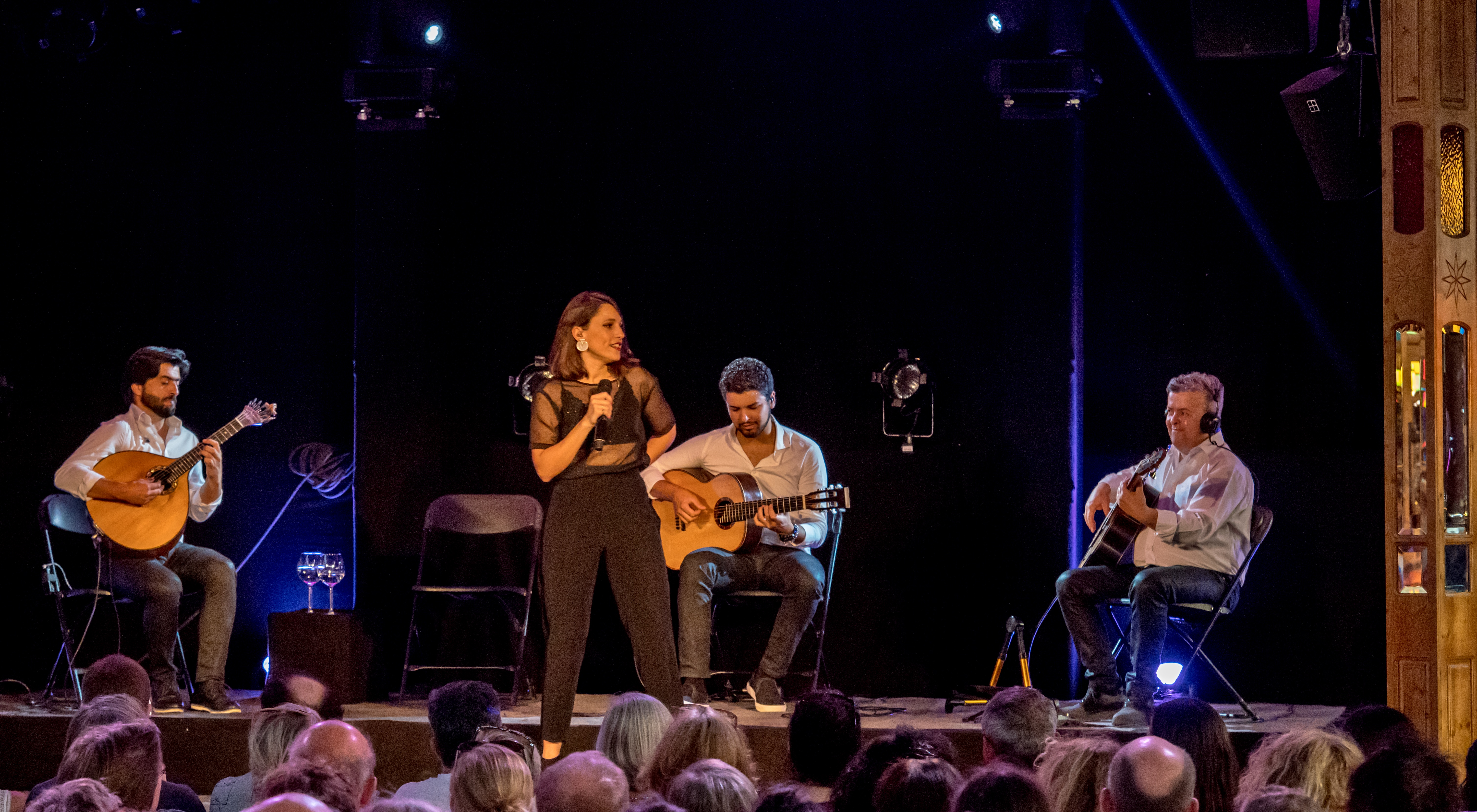 Bilder vom Zelt Musik Festival 2018 in Freiburg im Breisgau Auftritt Carminho am 24. Juli 2018 im Spiegelzelt